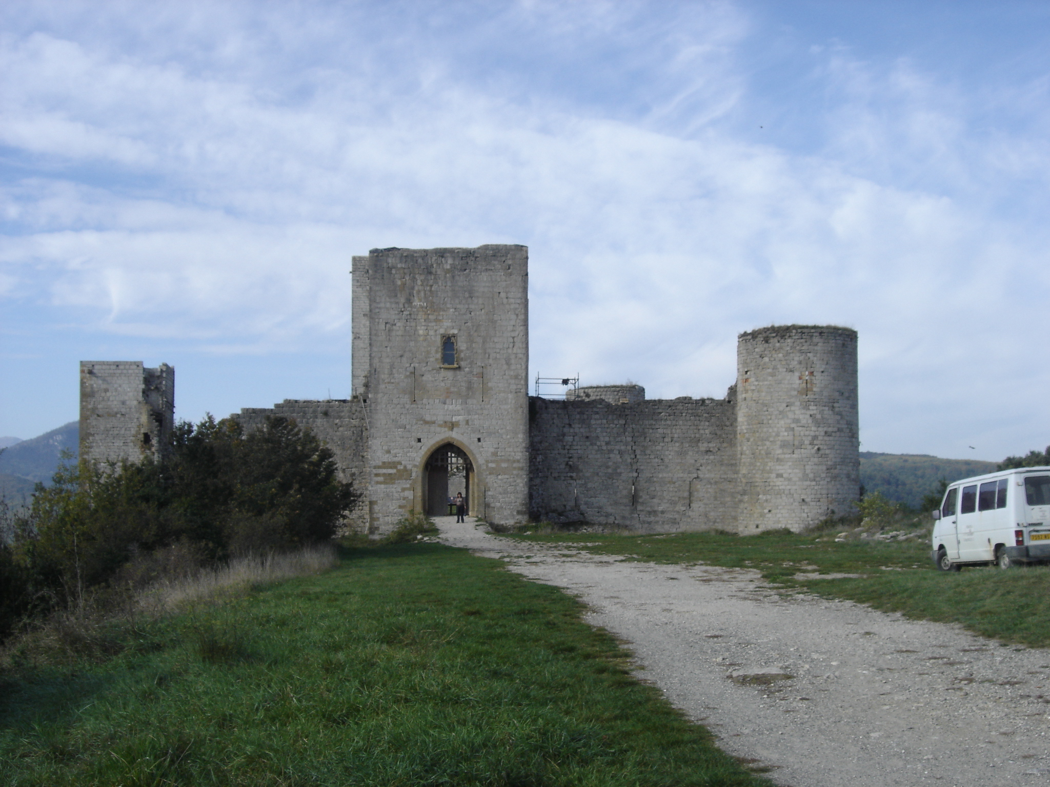 Le château de Puivert